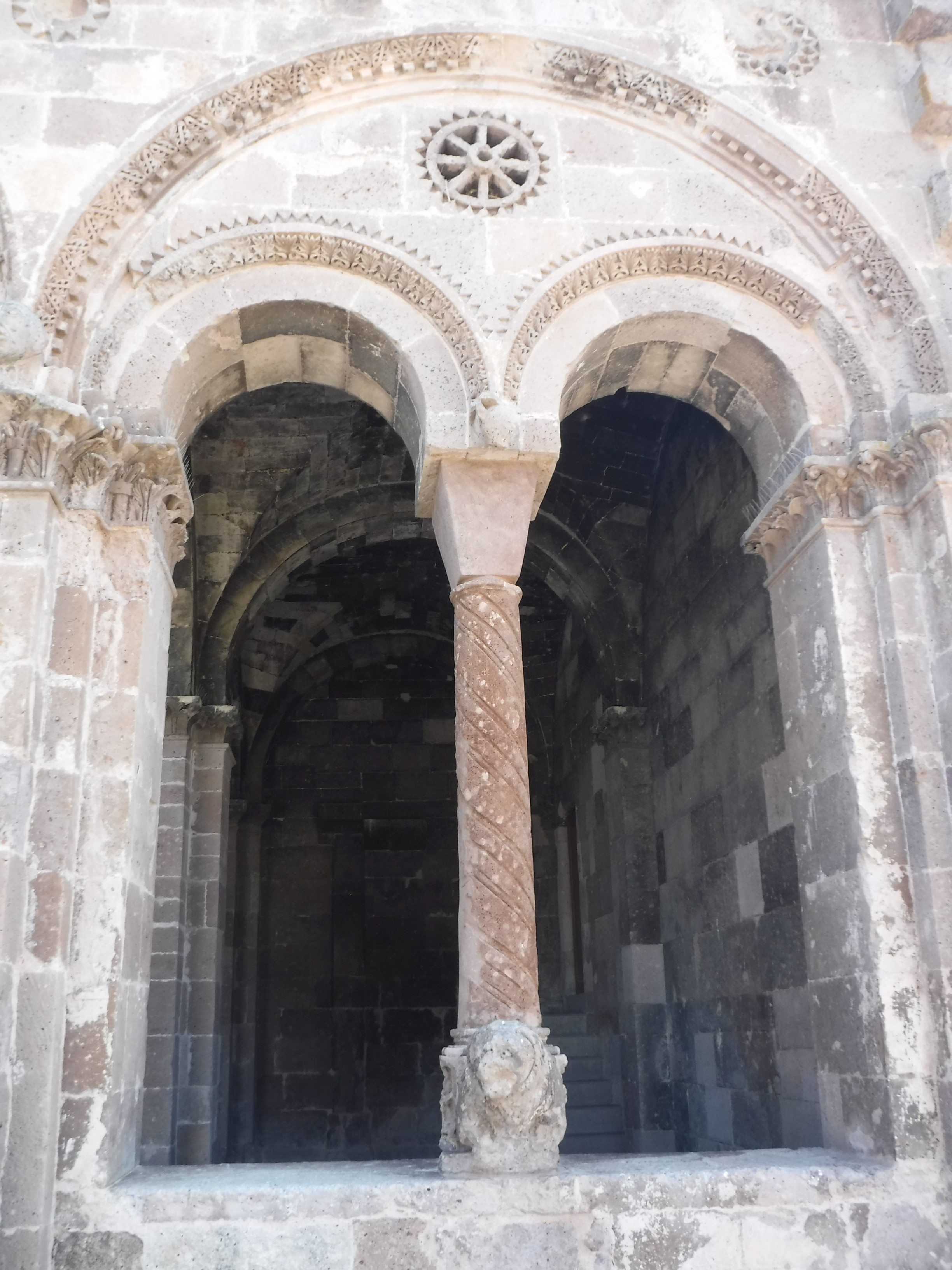 Sant'Antioco di Bisarcio, west facade